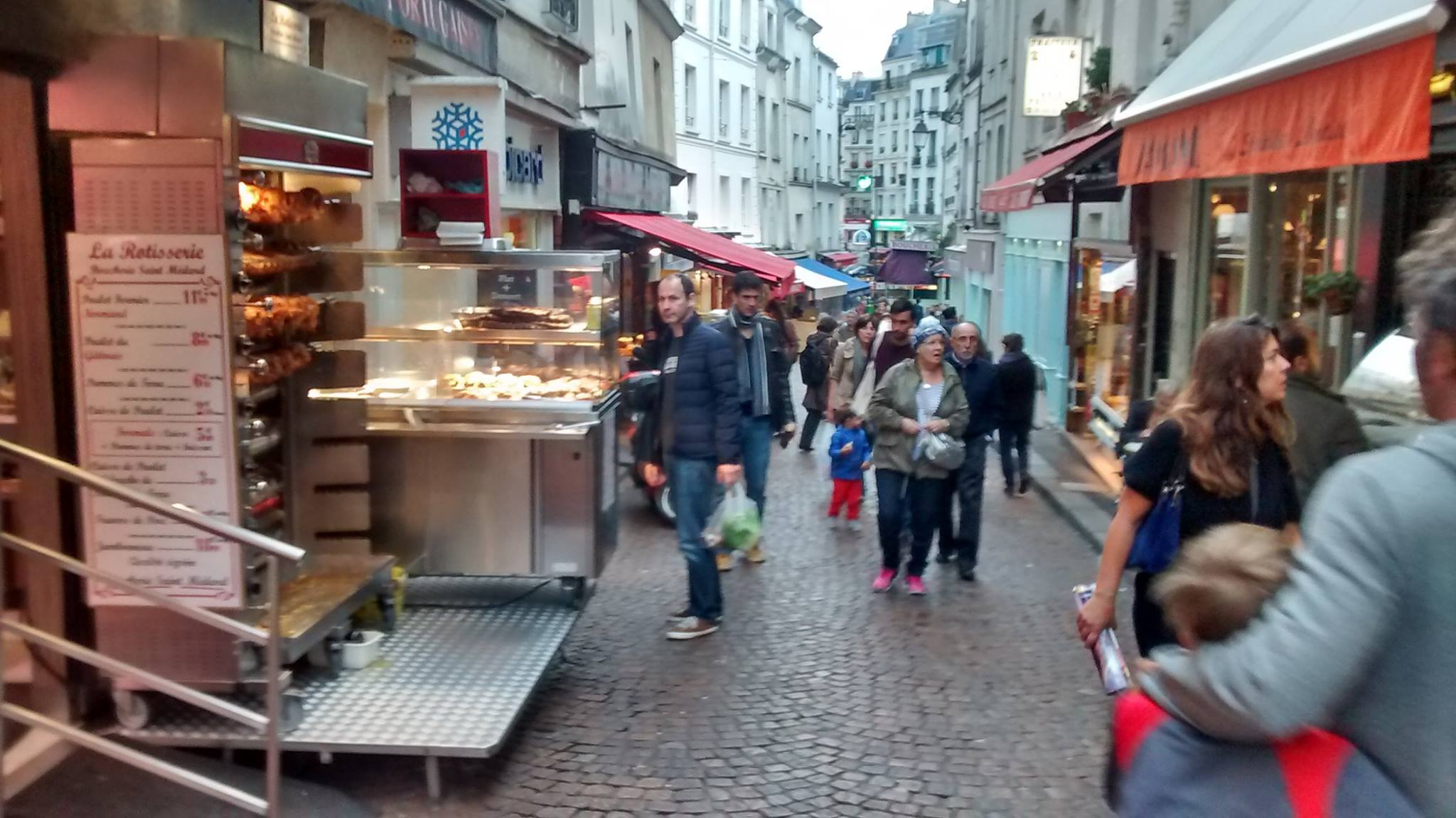 Petits commerces Rue Mouffetard